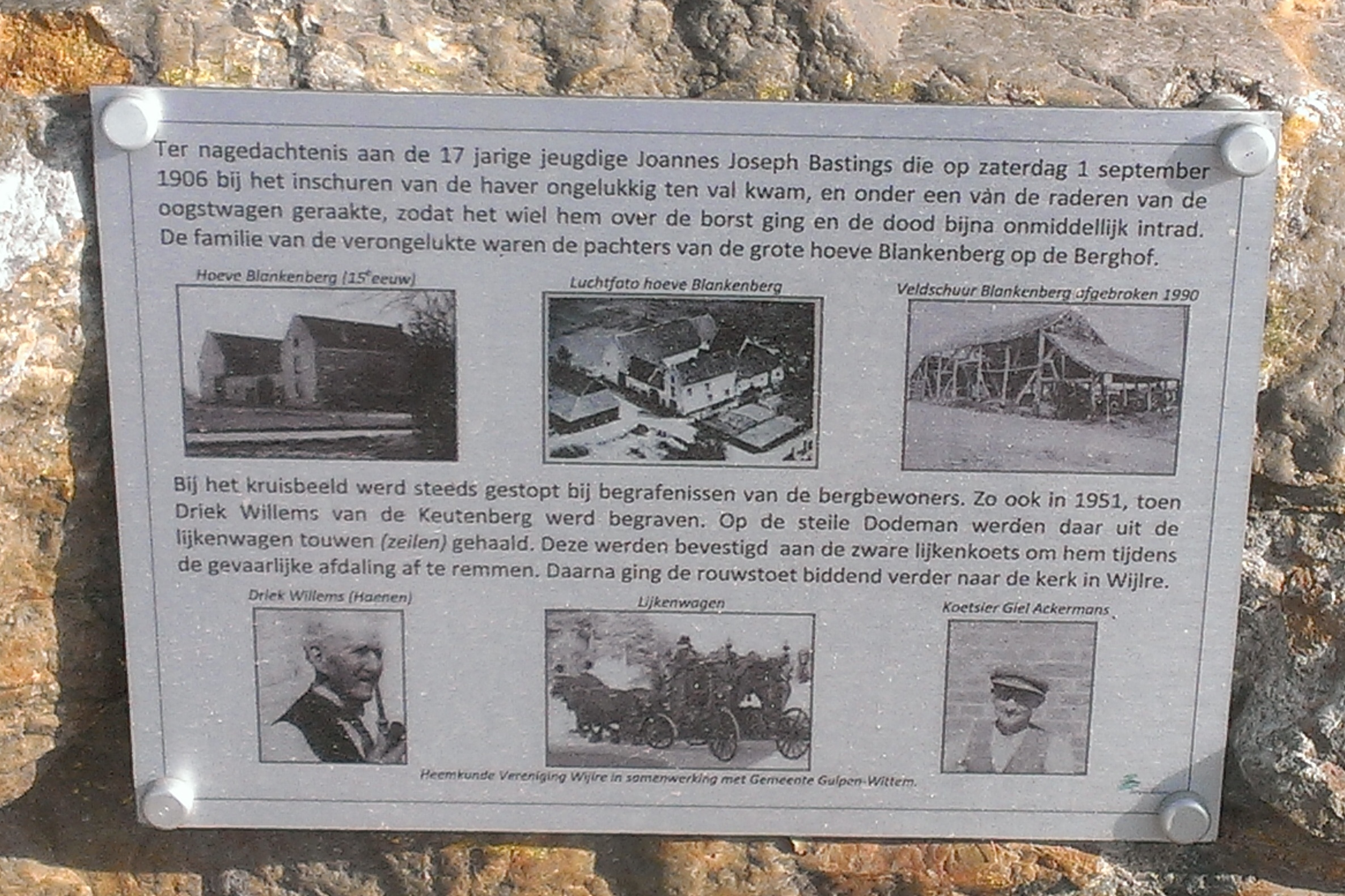 Bord met uitleg bij het wegkruis boven op de heuvel Doodeman bij Wijlre, Limburg.